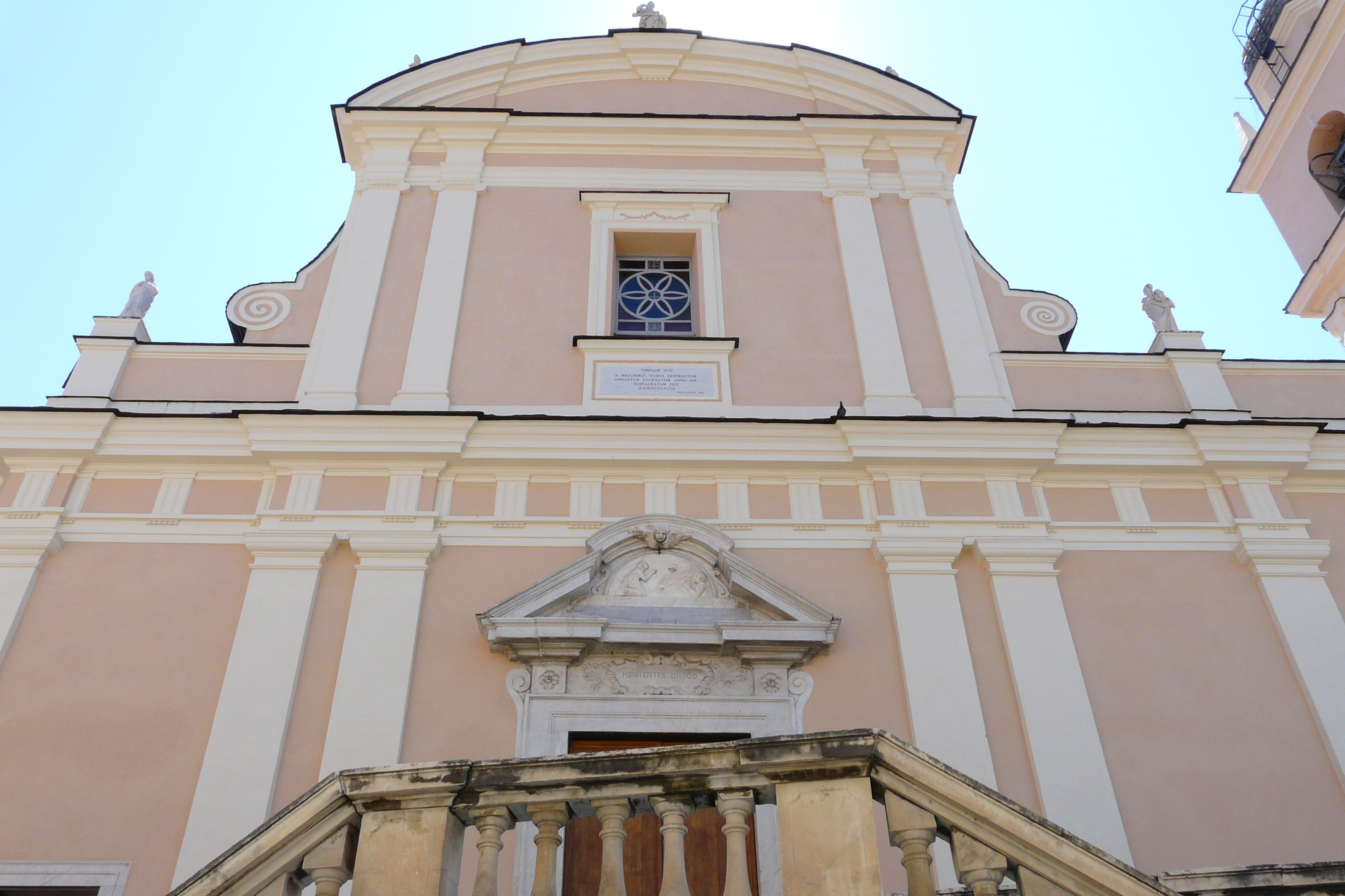 Chiesa di Santa Maria Maddalena, Castelnuovo Magra, Liguria, Italia